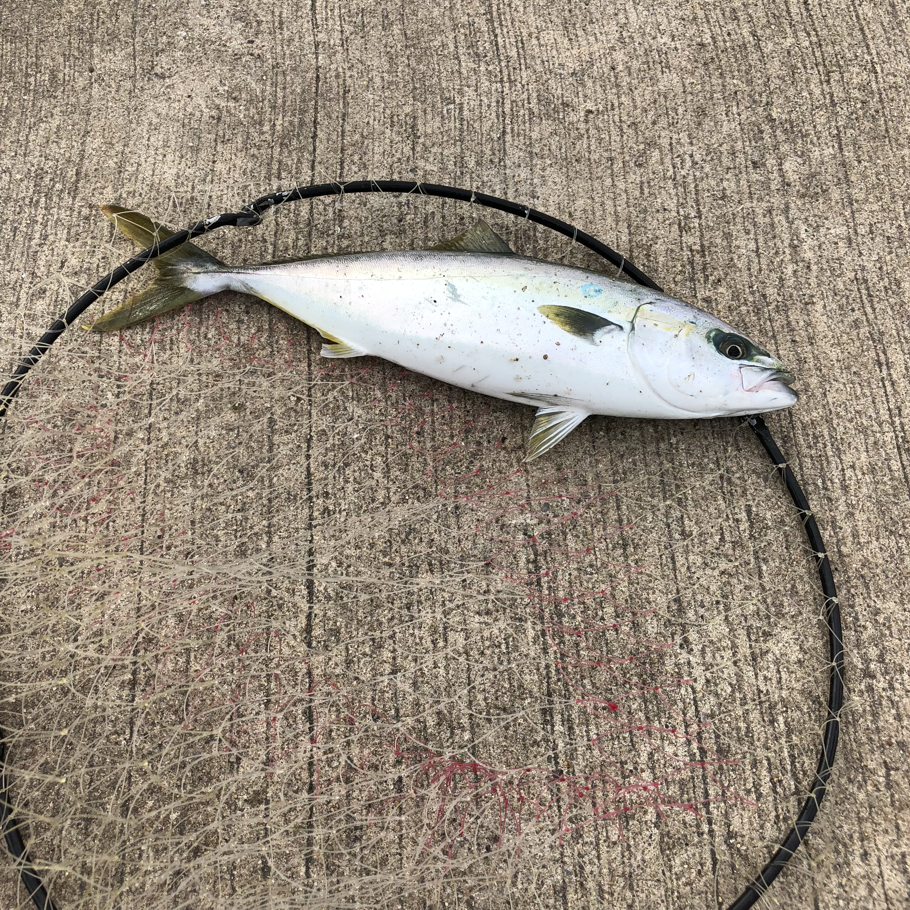 ヒラマサ 2017.11.10 鹿島港